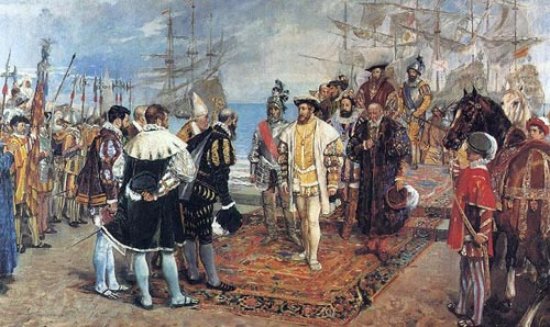 Desembarcament_de_Francesc_I_al_port_de_València_(1876) - Francisco I de Francia desembarcando en el puerto de Valencia (1876)